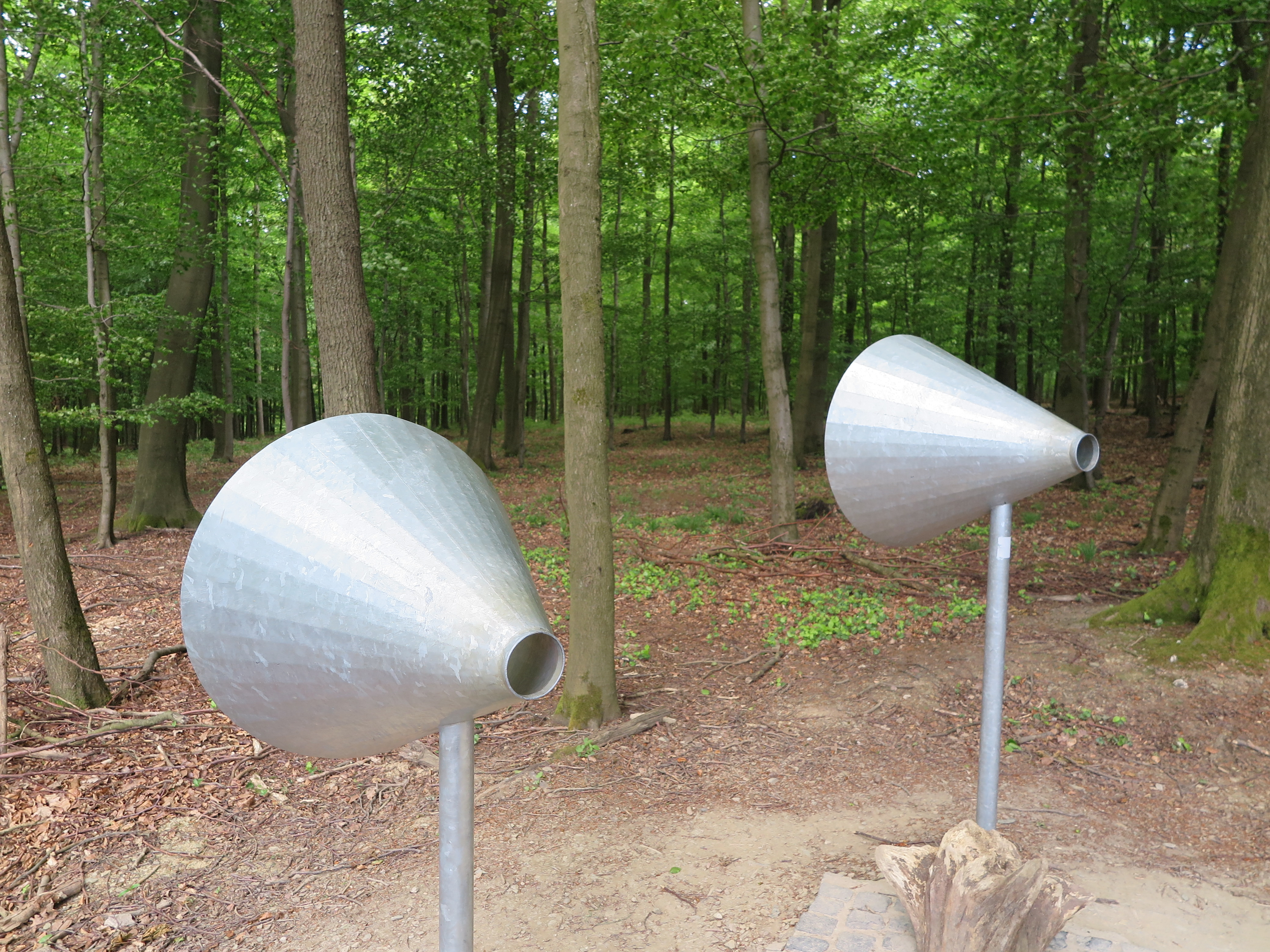 Hörtrichter am „Wilden Weg“ im barrierefreien Naturerlebnisraum „Wilder Kermeter“ im Nationalpark Eifel. Mit dem Hörtrichter können die Geräusche des Waldes, wie Vogelzwitschern und Blätterrauschen, intensiver wahrgenommen werden.